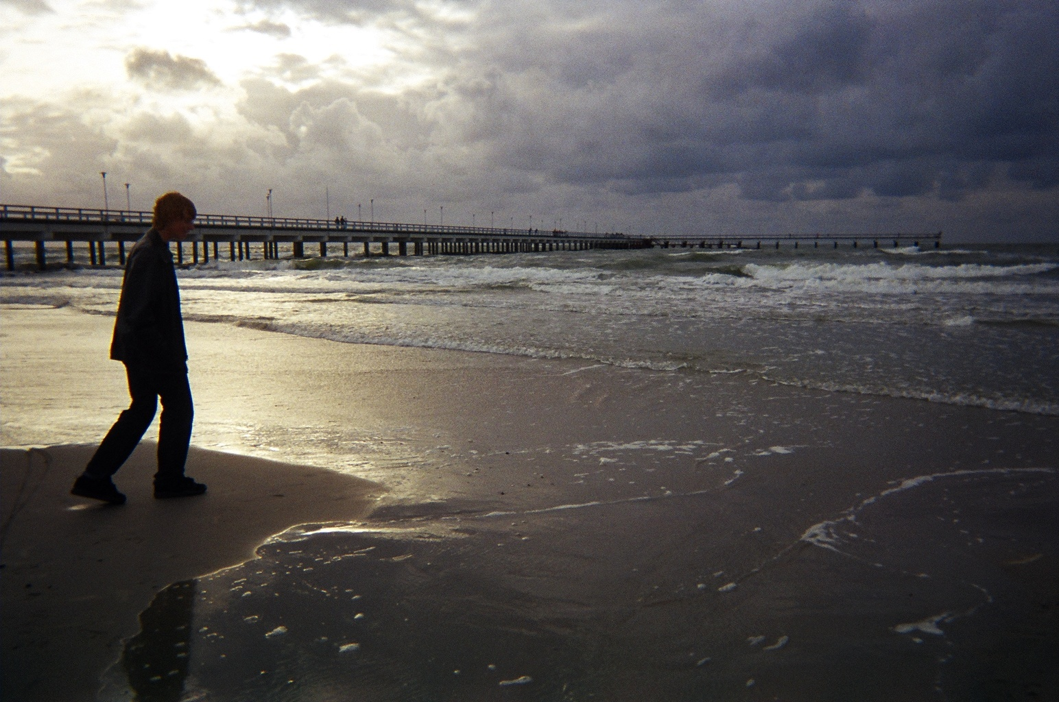 Palanga, Lithuania